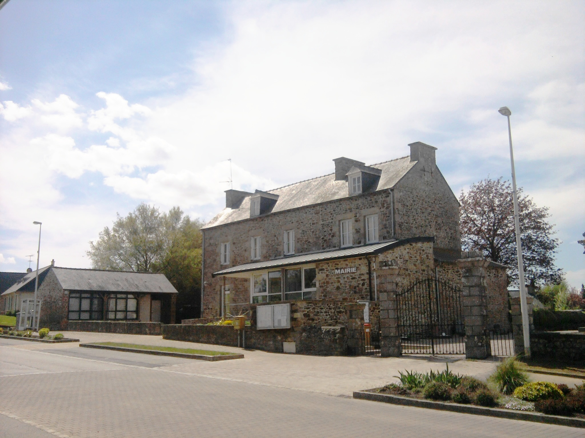 Mairie de Noyal, dép. de Côtes-d'Armor (France)